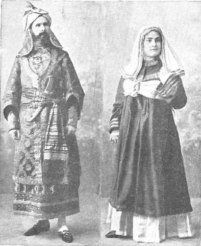 Acto III Escena III Munuza (Sr. González) y Zara (Srt. D Mingo), de Compañy.jpg. Fotografía de Manuel Compañy.